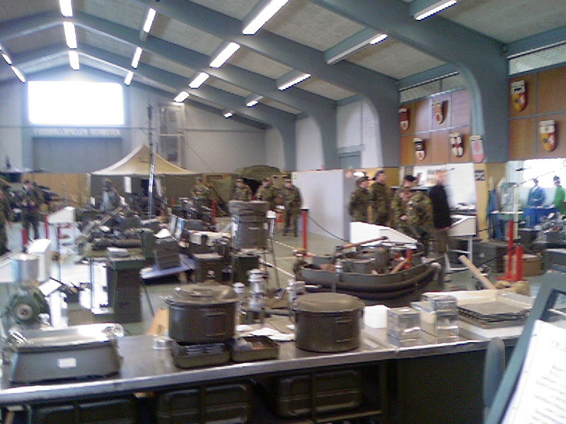 Großgerätesammlung der lippischen Rose Augustdorf in der Generalfeldmarschall-Rommel-Kaserne